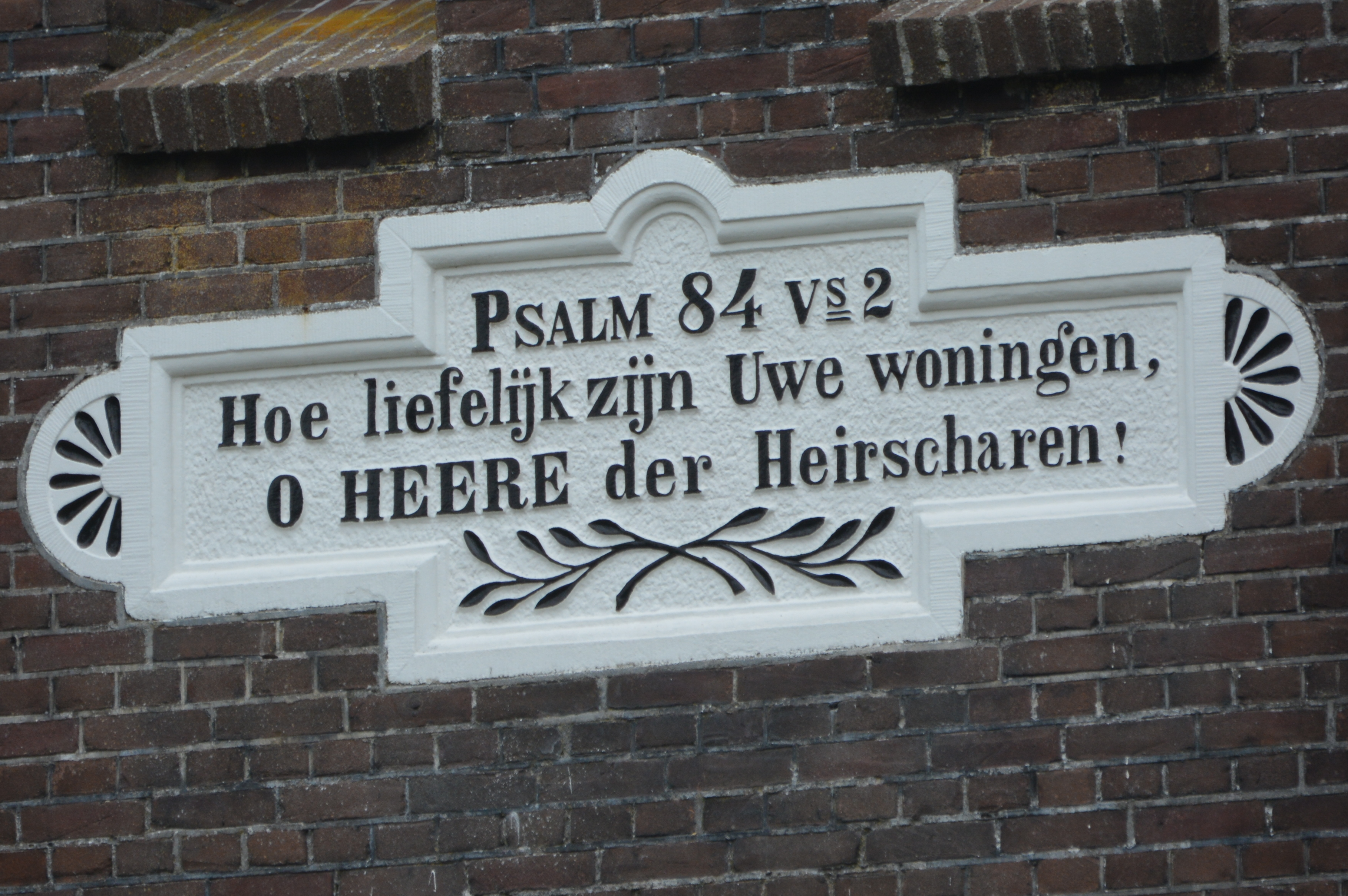 Steggerda, gevelstien protestantske tsjerke